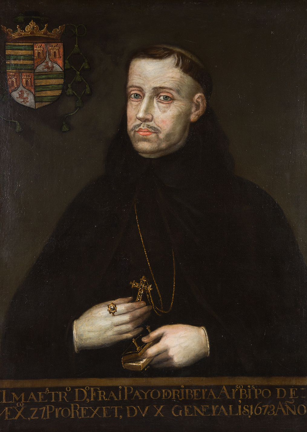 Portrait of Payo Enríquez de Rivera (1622-1684)